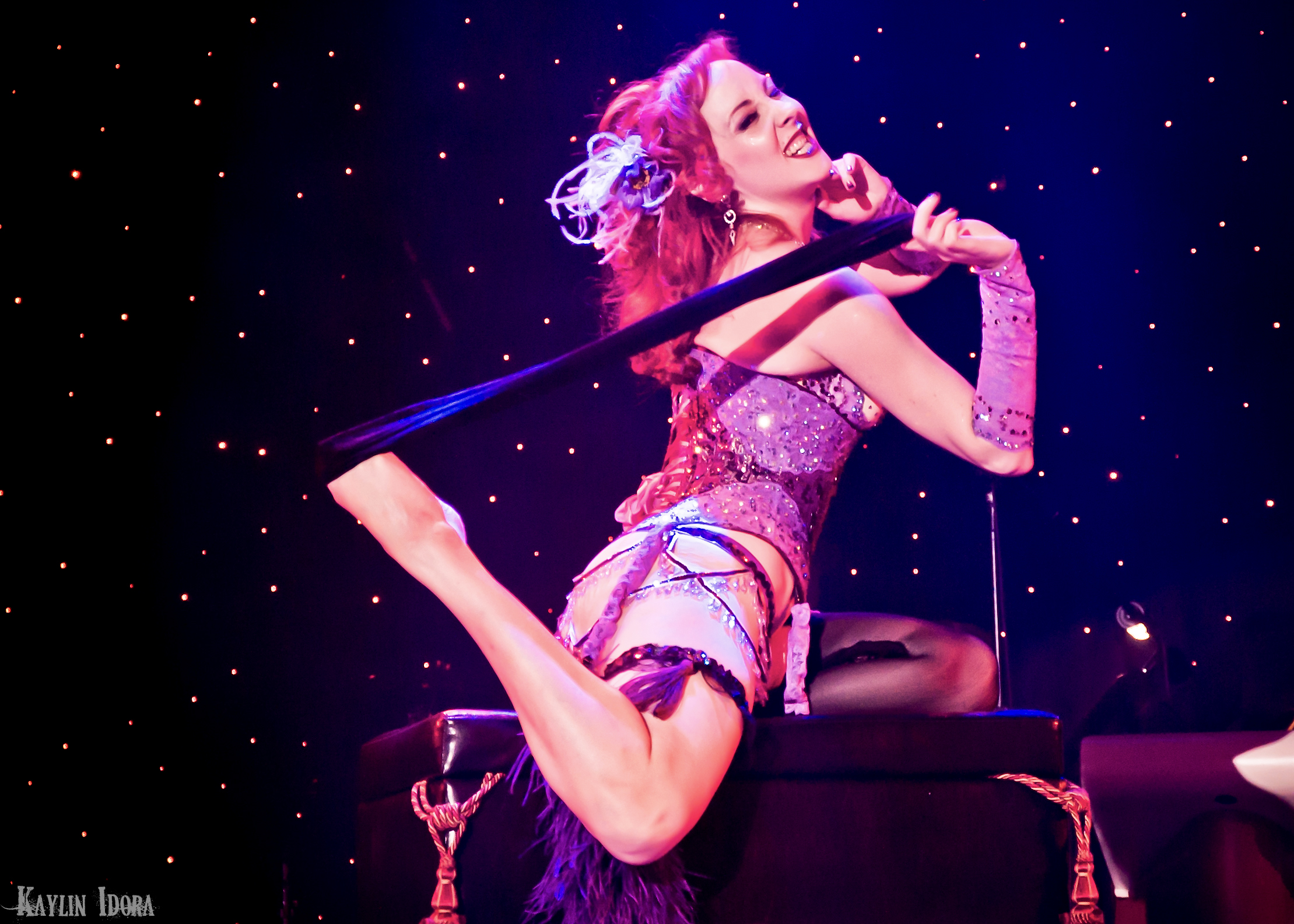 New Orleans Burlesque Festival